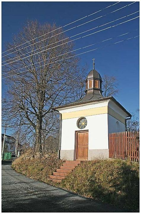 Kaple v obci Podmoky, district Havlíčkův Brod